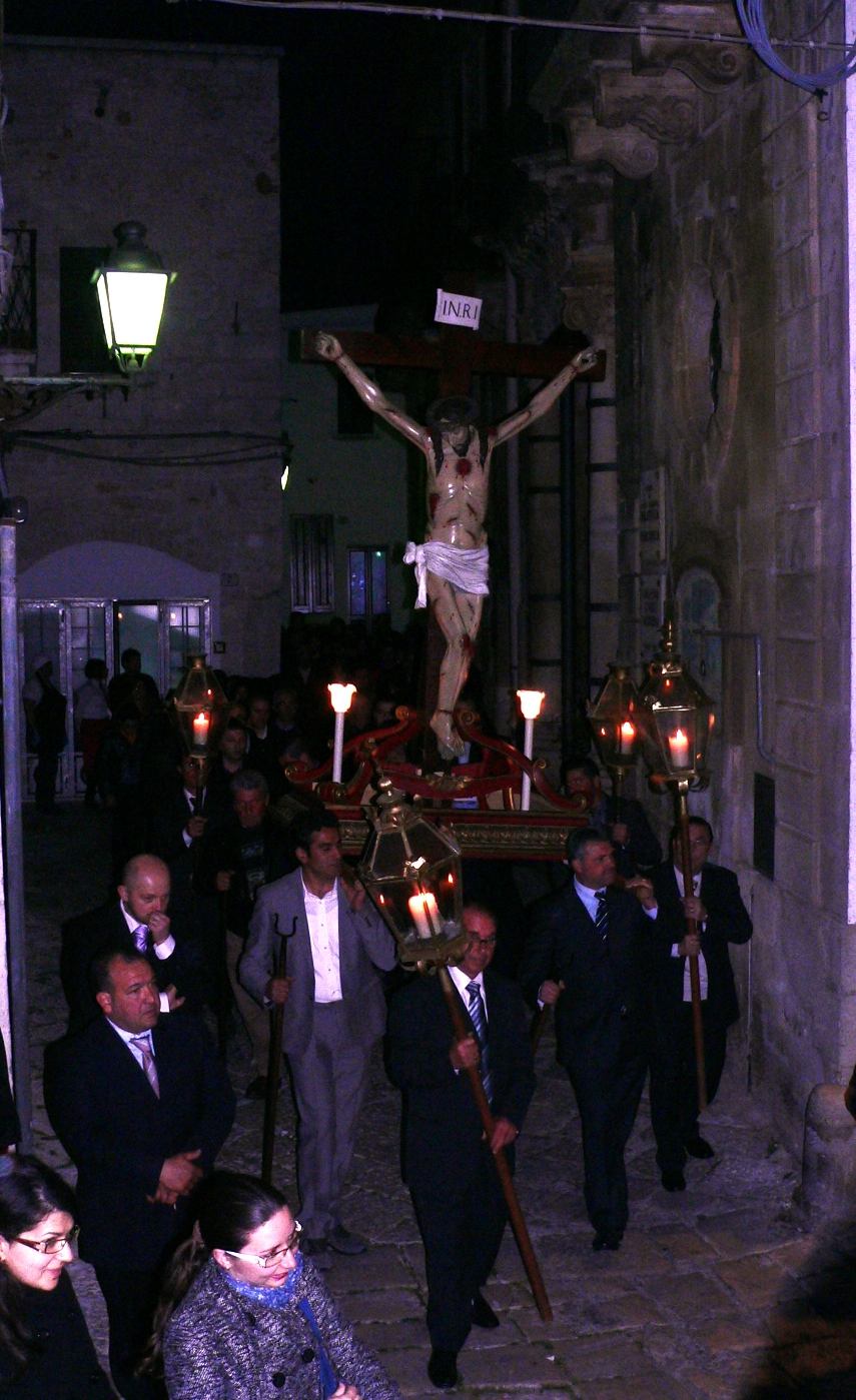 Statua del Crocefisso portata in processione a Ceglie Messapica in occasione della processione dei Misteri e del Crocifisso.